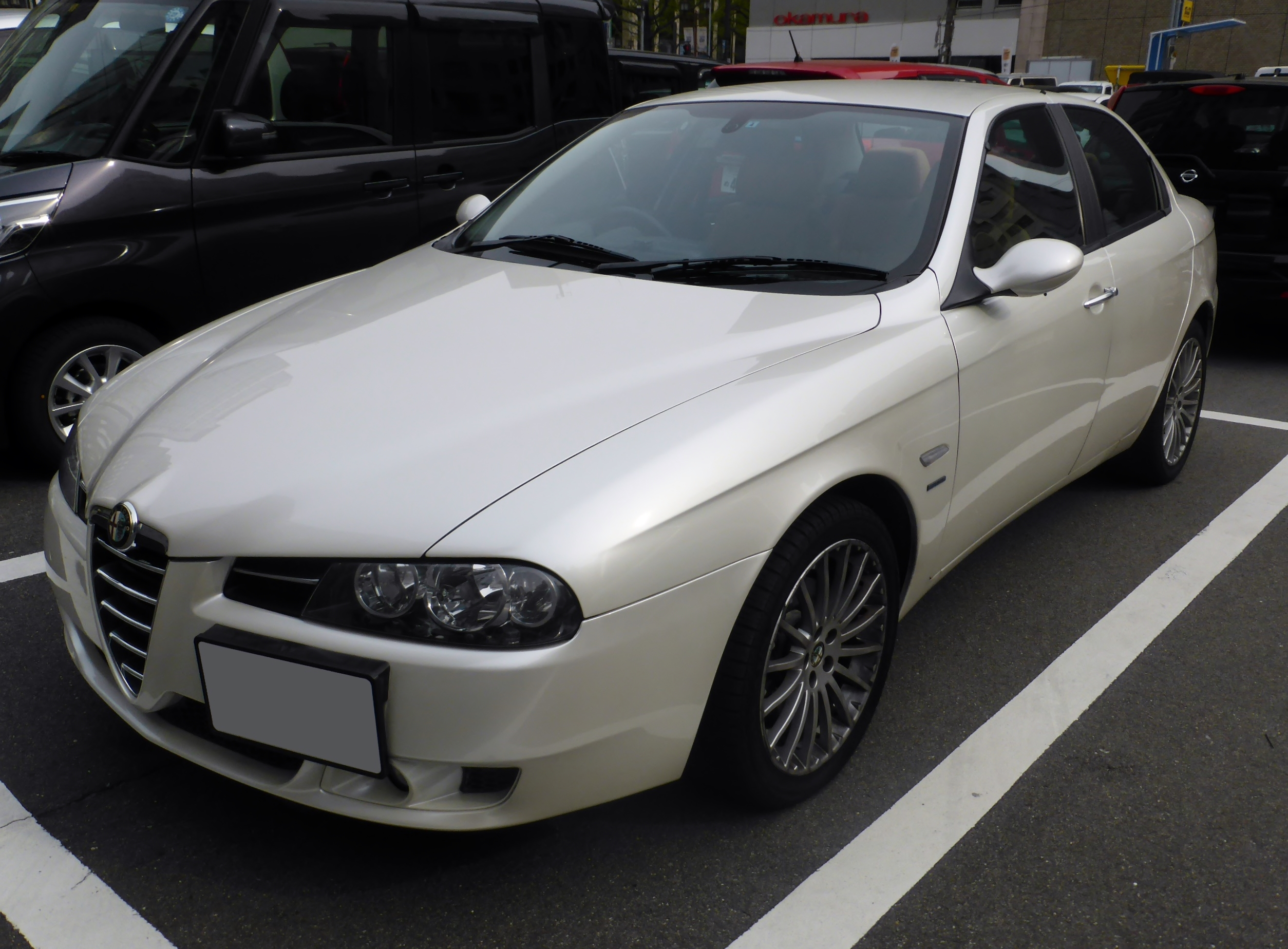 アルファロメオ・156 2.5 V6 24Vをフロントから撮影。